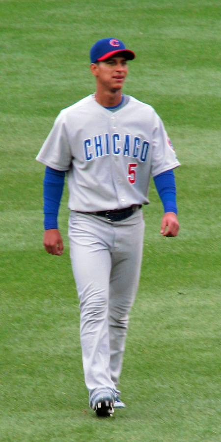 Ronny Cedeño